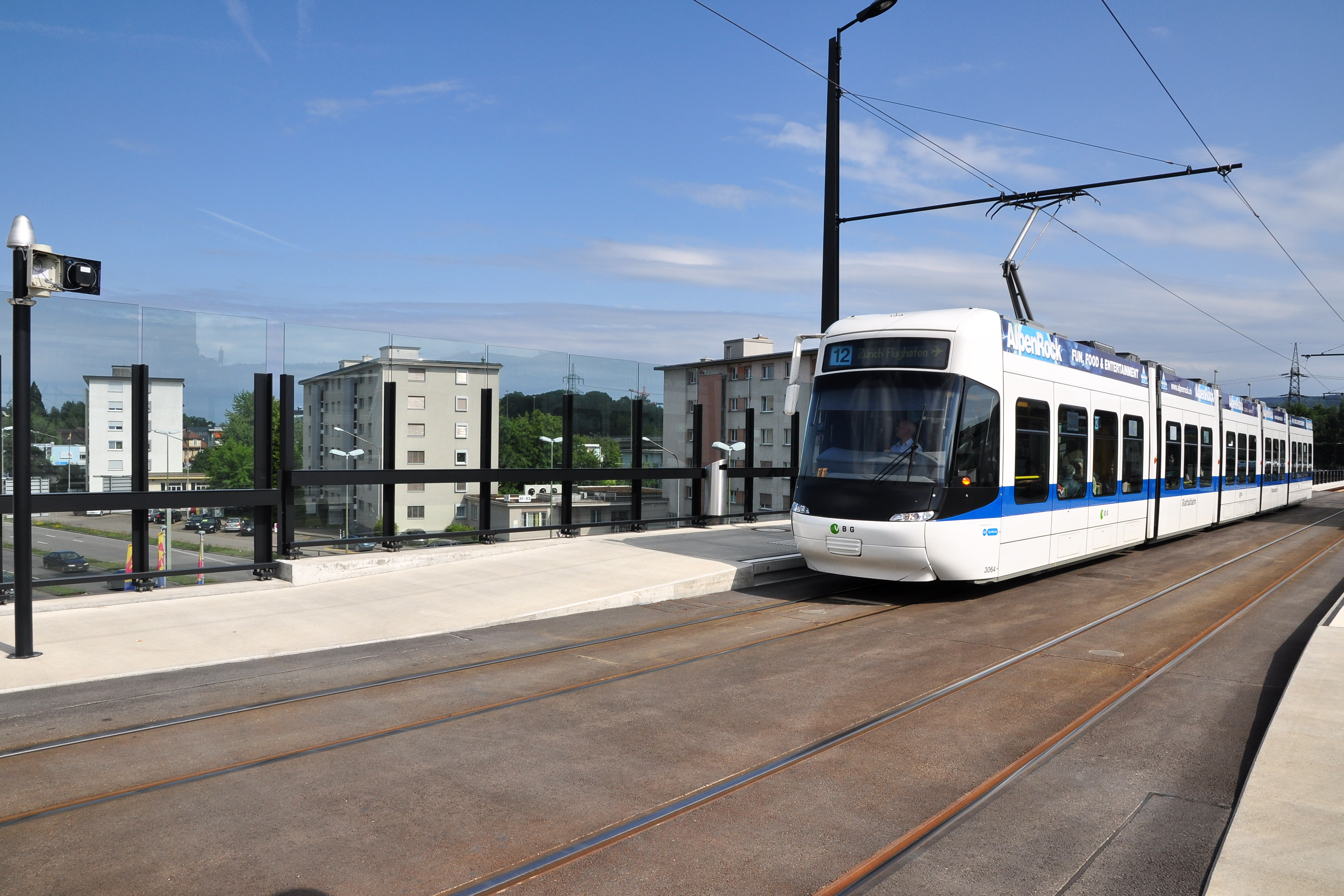 Glattalbahn train station Glattzentrum in Wallisellen (Switzerland)